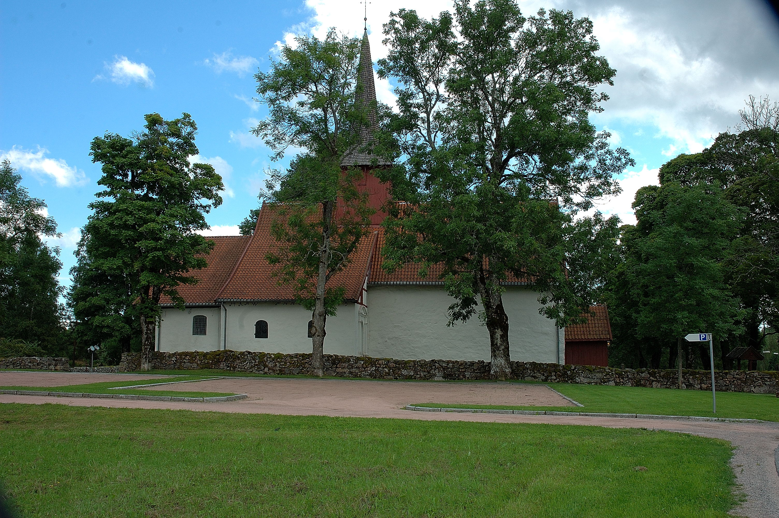 Tanum Church in Baerum Norway Tanum Kirke i Bærum